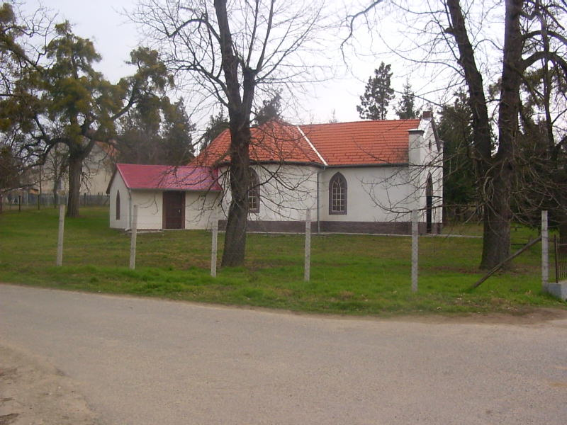 Kápolna a Veszprém megyei Gic községben